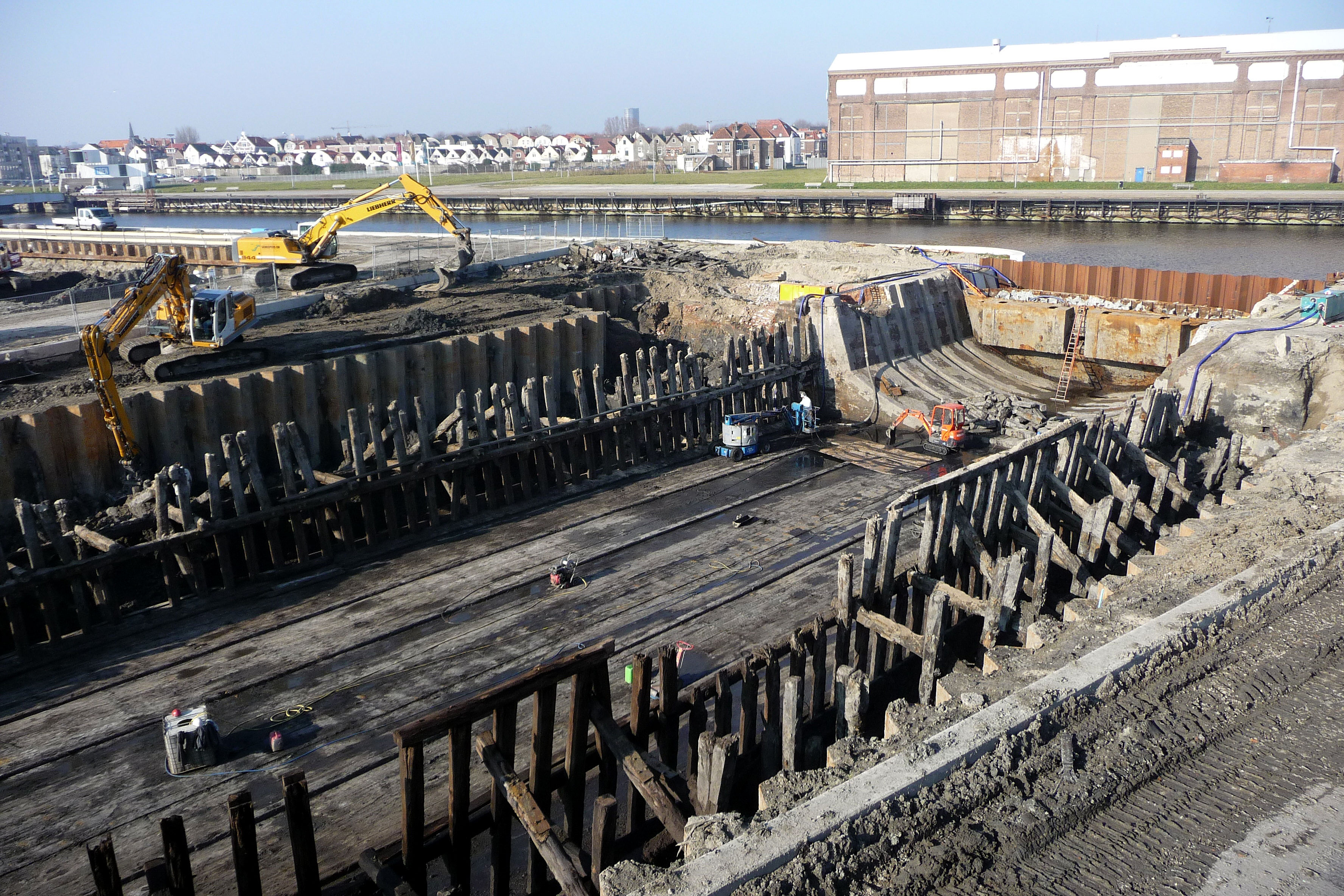 Dok van Perry in Vlissingen, in uitgegraven toestand op 2-3-2011.